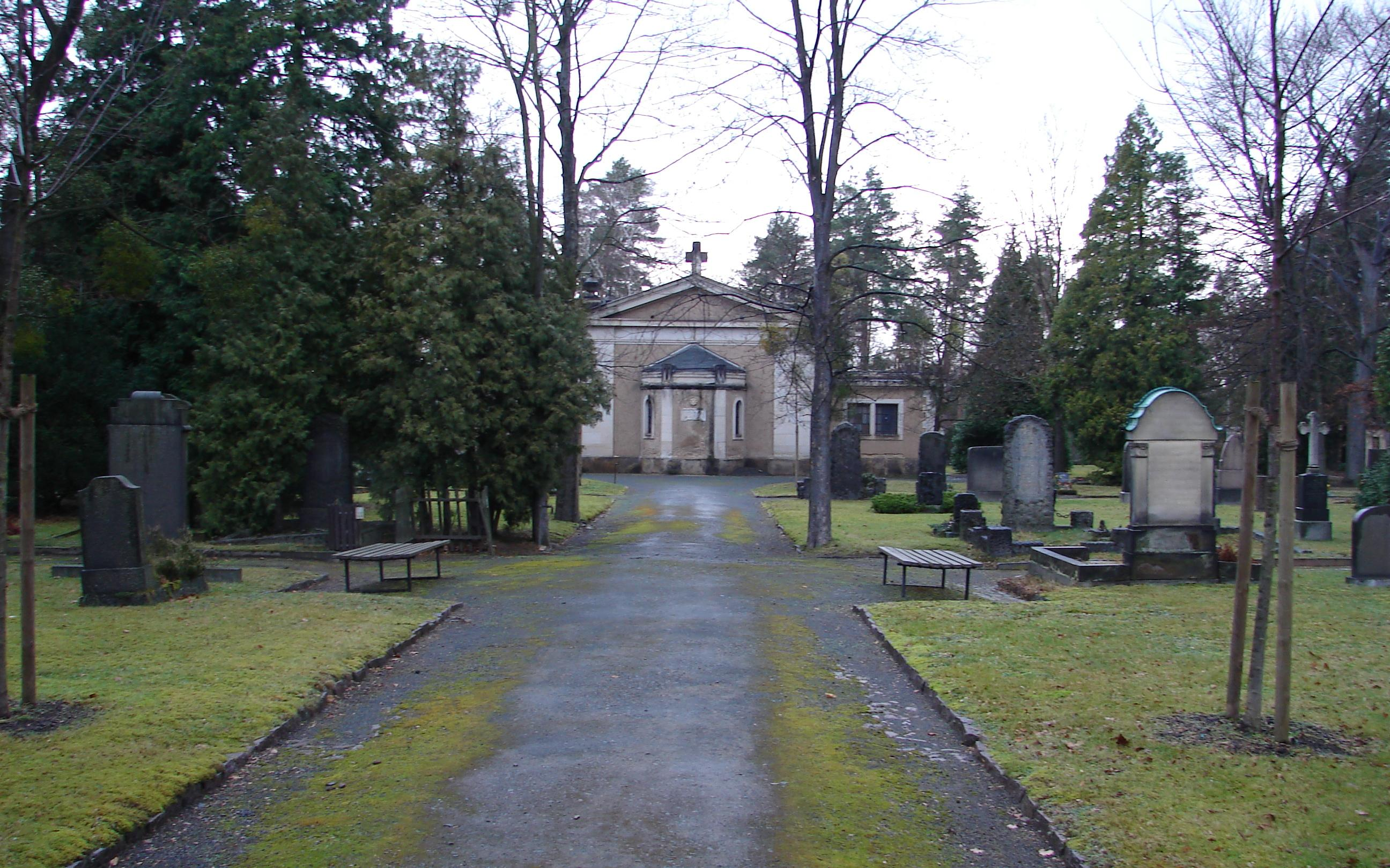 Nordfriedhof Dresden, im ältesten Friedhofsteil, mit Friedhofskapelle